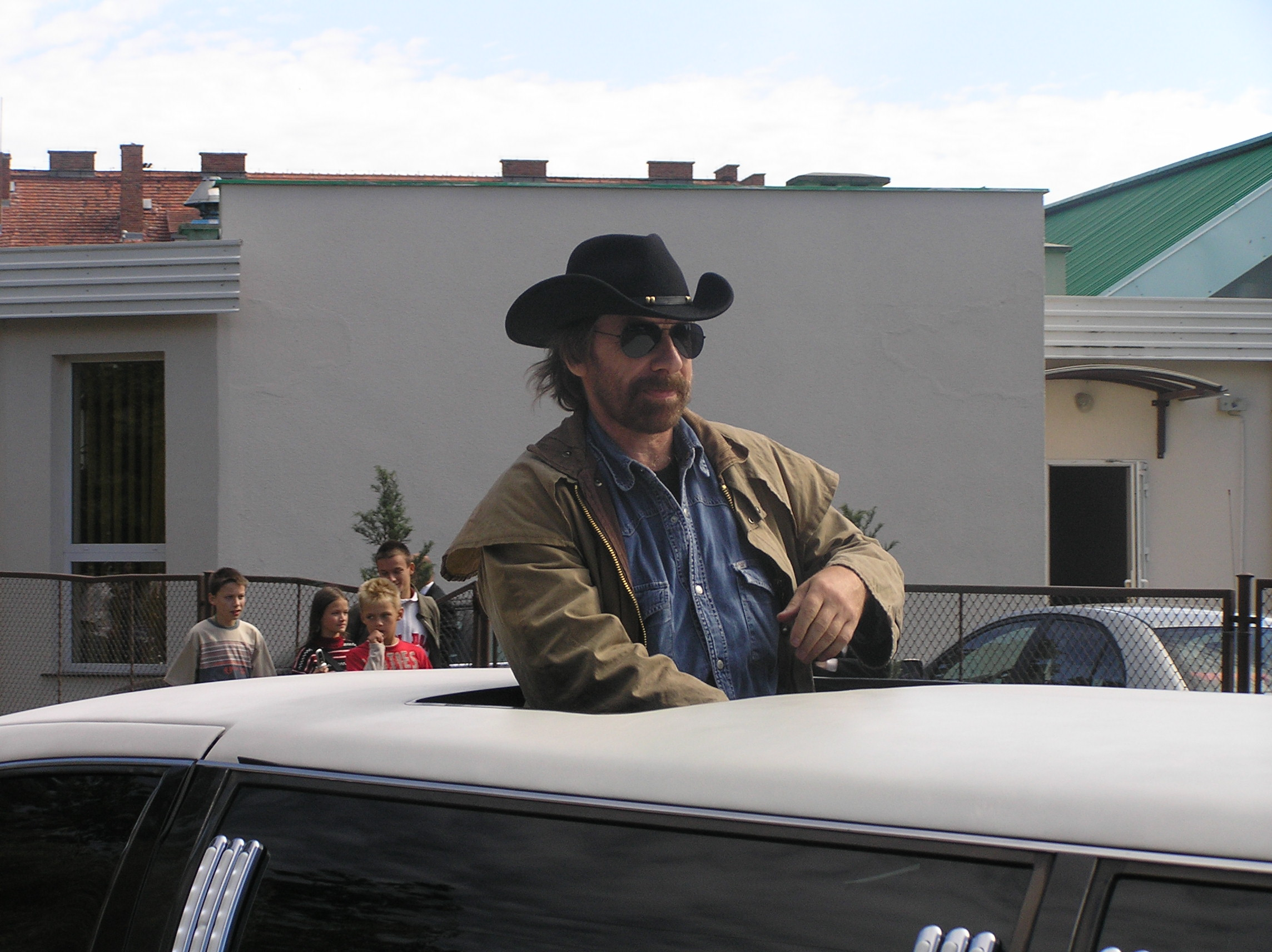 Jacek Pieniążek – sobowtór Chucka Norrisa